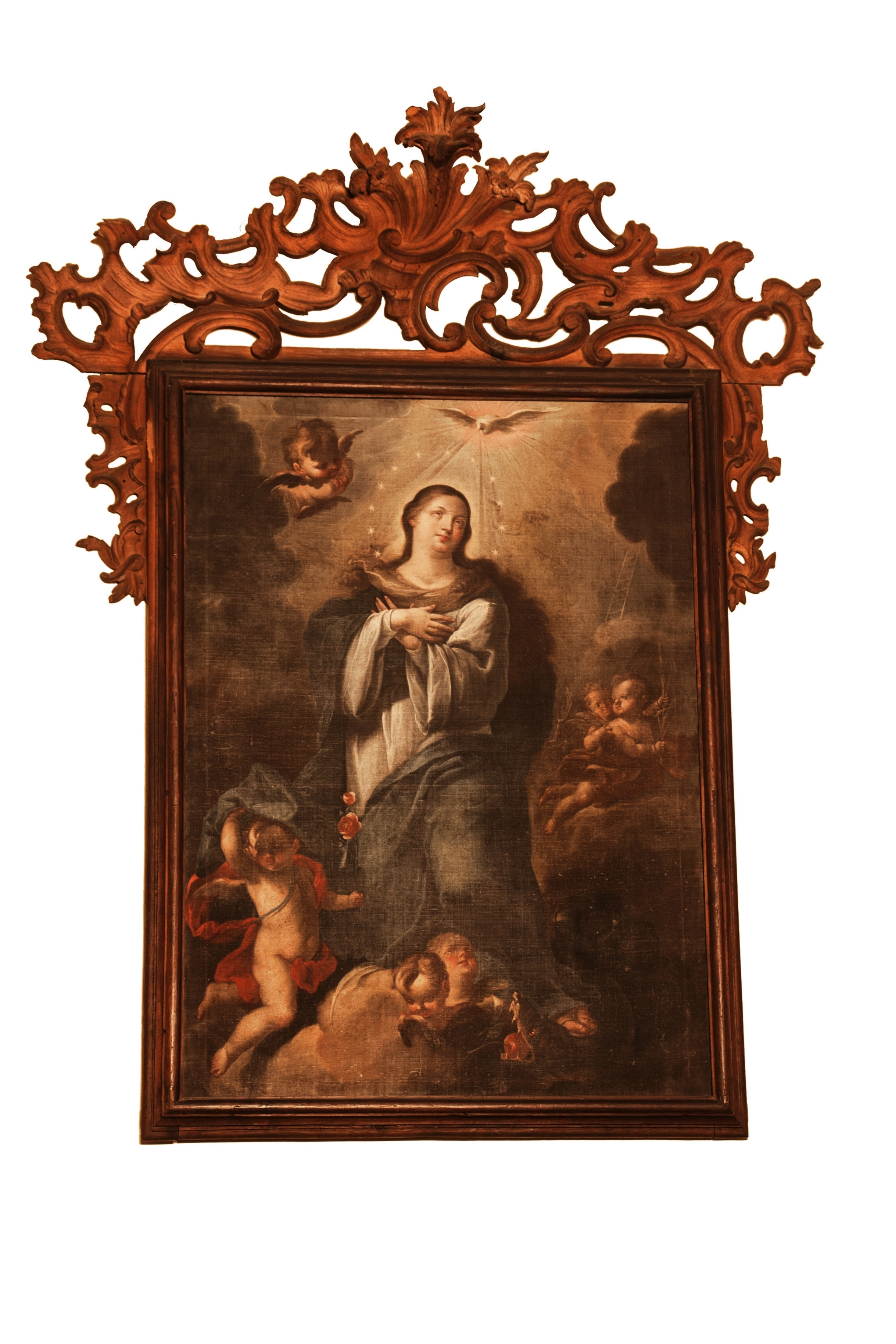 La Virgen se eleva sobre un cúmulo de nubes mientras con su pie izquierdo aplasta al dragón portador de la manzana del pecado original. Se configura siguiendo otras obras iconográficas de Juan de Miranda, con el rompimiento de gloria que domina toda la escena, la presencia de querubines alrededor de la figura central, el modelo del ángel a sus pies, el manto que la envuelve o la larga melena que se despliega sobre sus hombros.